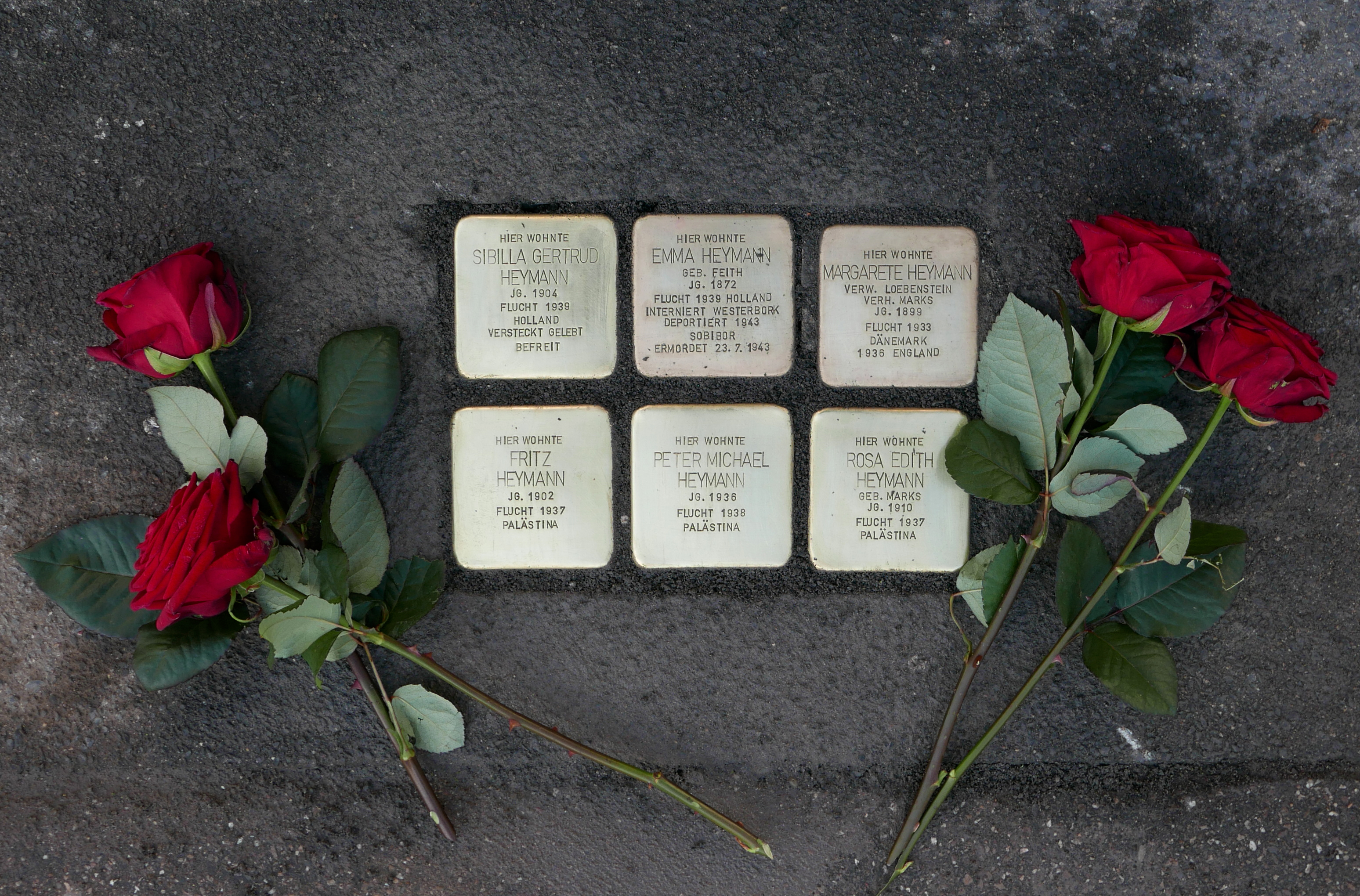 Stolpersteine Köln, Kinkelstrasse 9, Verlegestelle Familie Heymann, verlegt 2018 und 2019